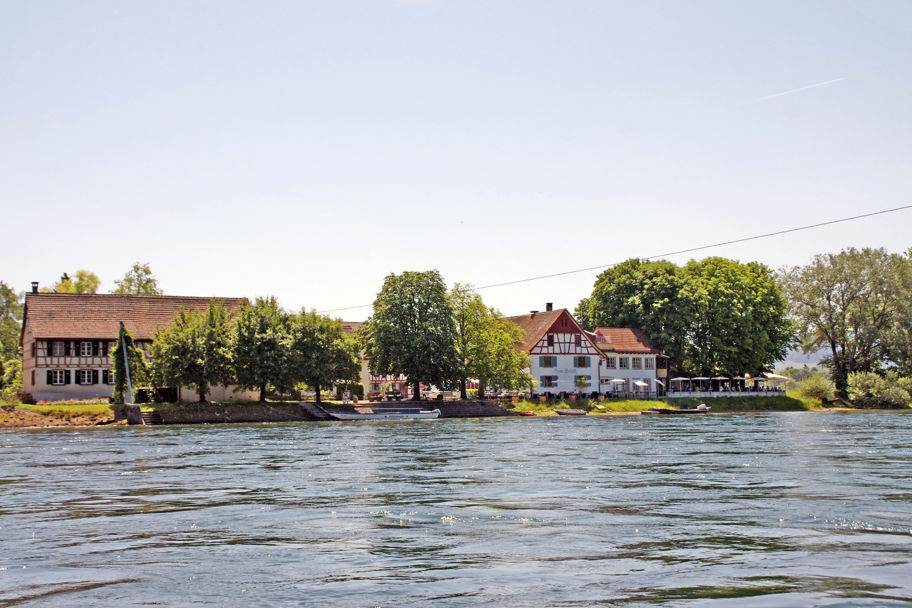 Ellikon am Rhein - Seilfähre: Lmg-Waffenstellung Ellikon A 5451